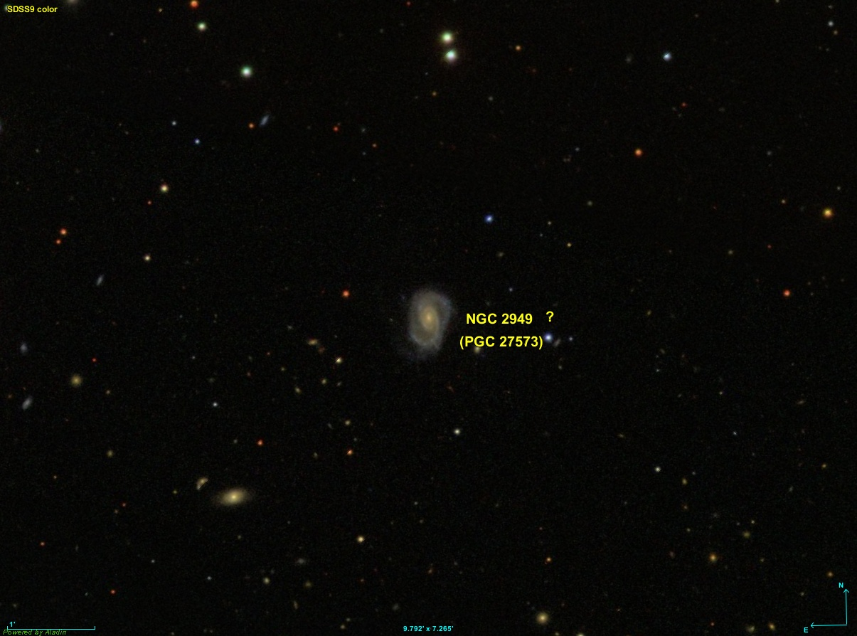 Image créée à l'aide du logiciel Aladin Sky Atlas du Centre de Données astronomiques de Strasbourg et des données publiques en format FIT de SDSS (Sloan Digital Sky Survey).